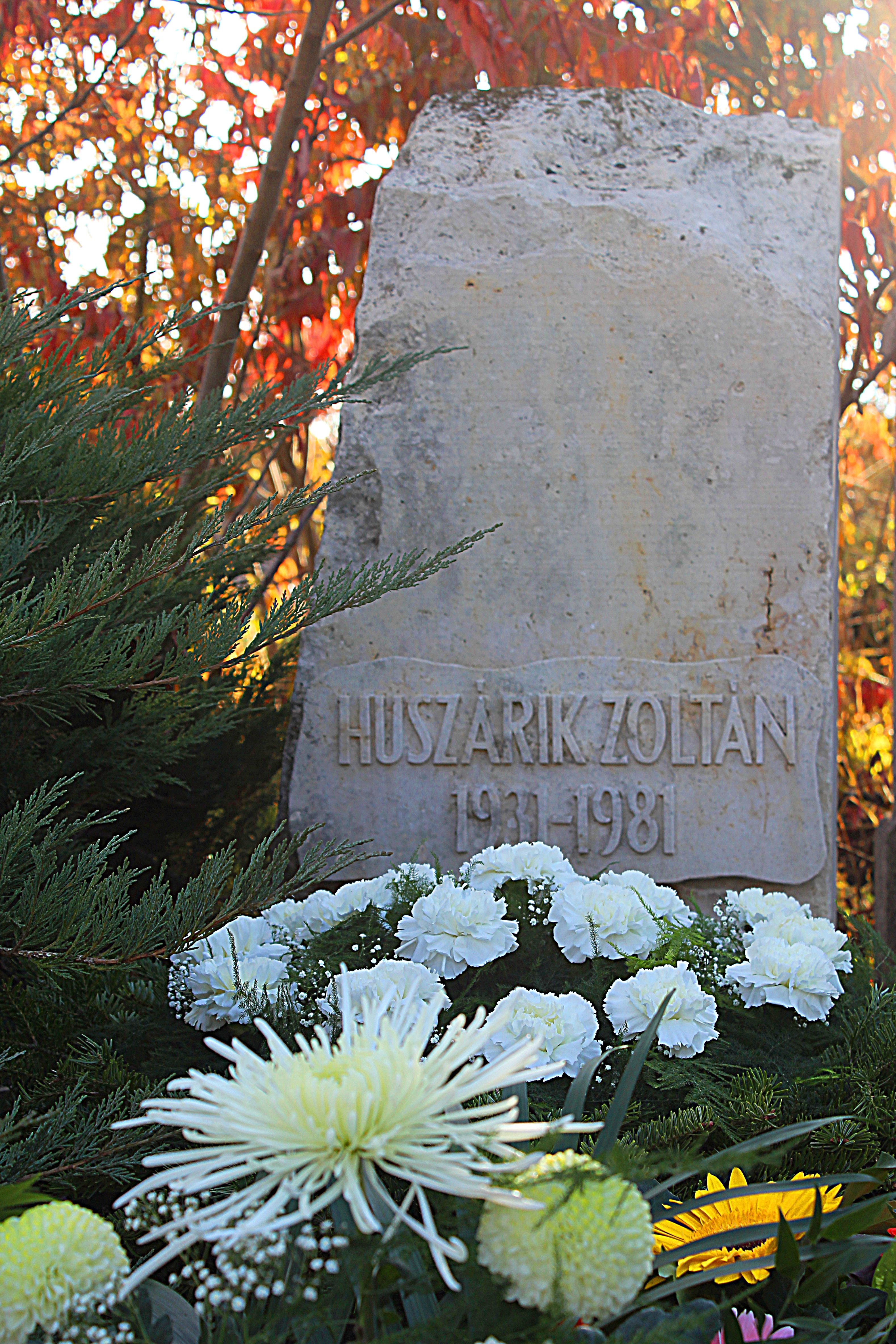 Domony, temető Esemény: Huszárik Zoltán szobor avatása